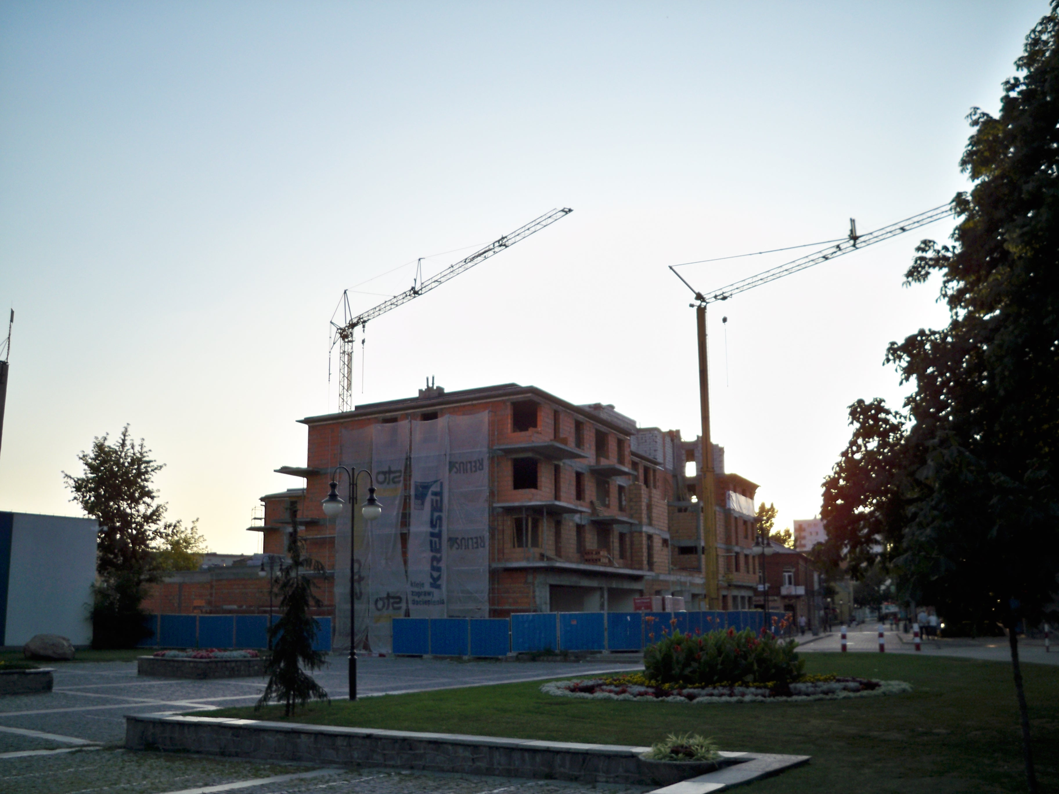 Budowa budynku przy ul. Królewieckiej 41/43 we Włocławku (2009 r.)